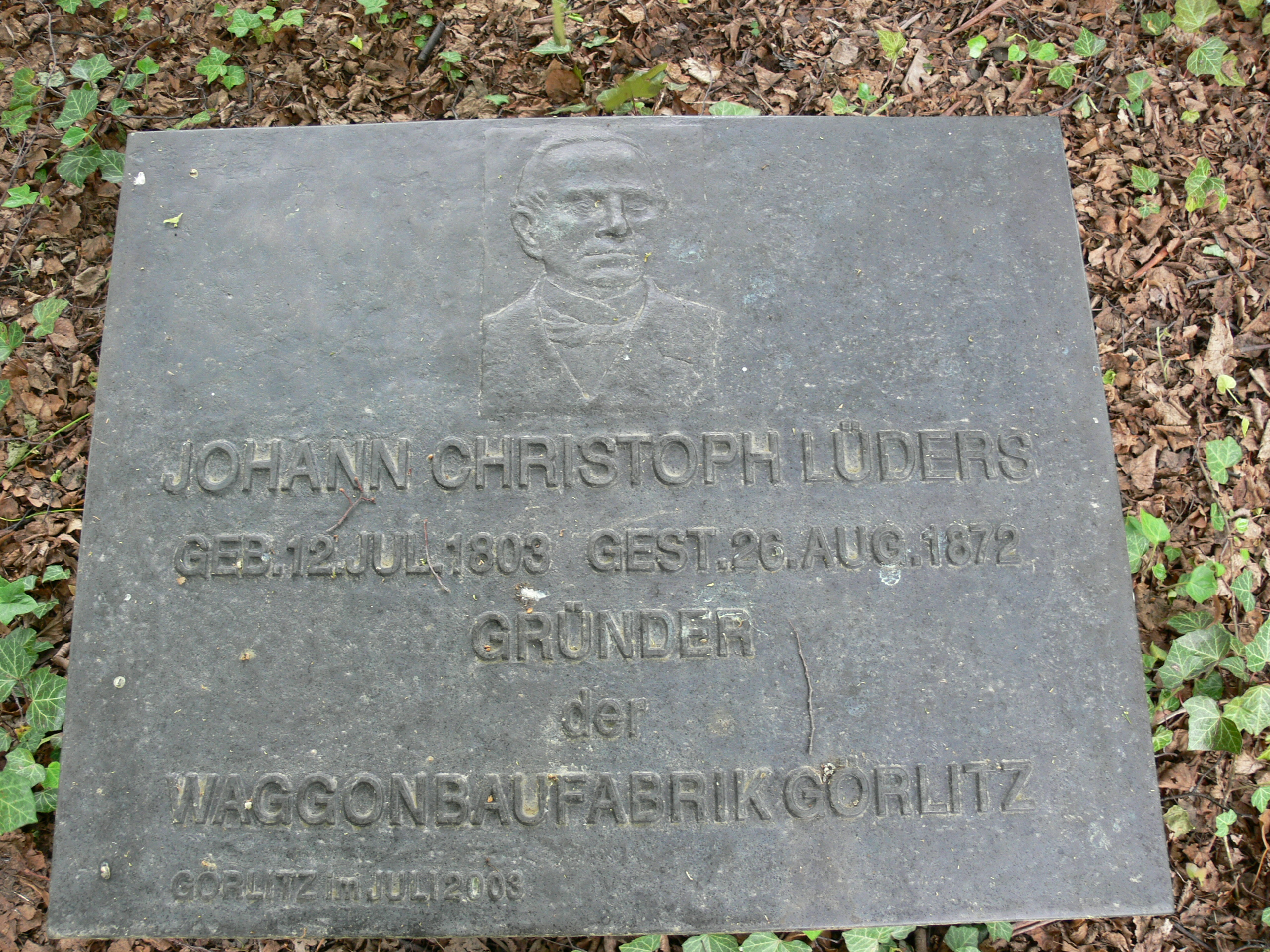 Gedenktafel f. Johann Christoph Lüders am Familiengrabmal Lüders, Städtischer Friedhof, Görlitz